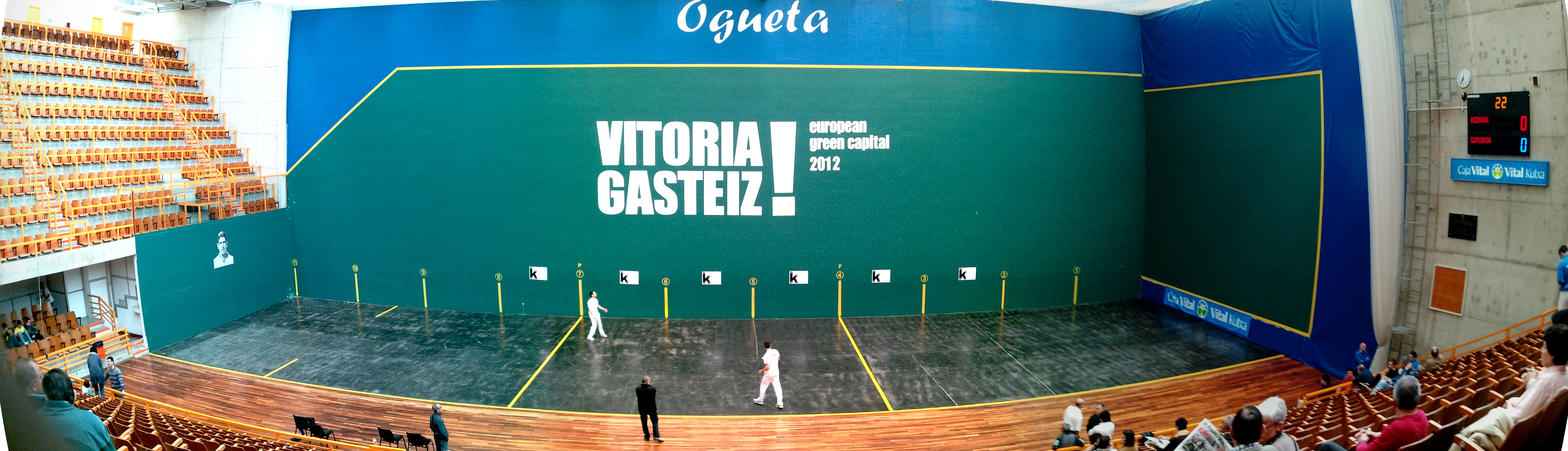 Ogeta pilotalekua